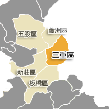 三重區相對位置。